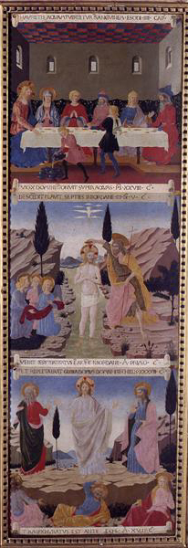 Armadio degli argenti